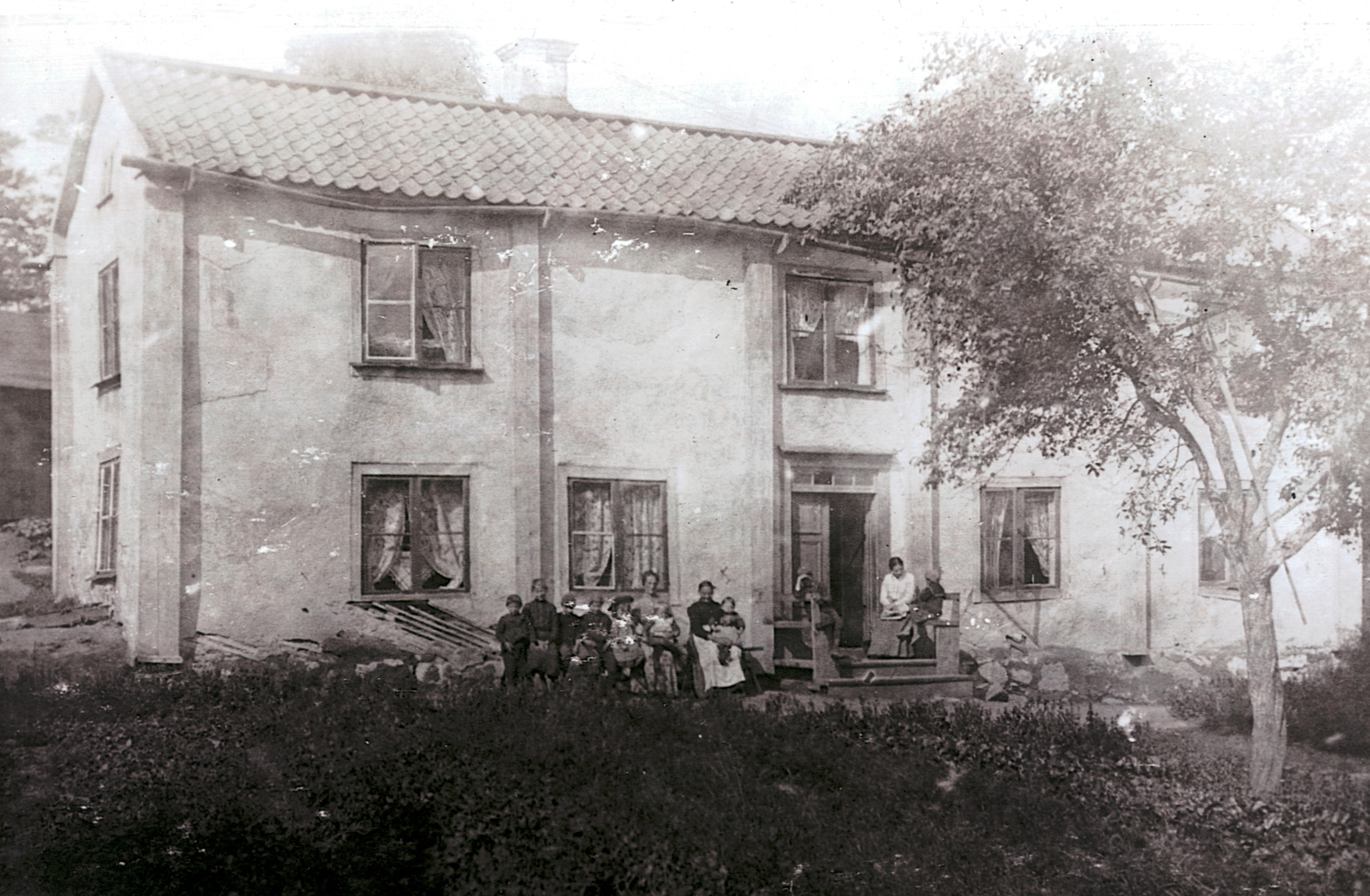 Övre Dammtorp, 28/8-1903, okänd fotograf